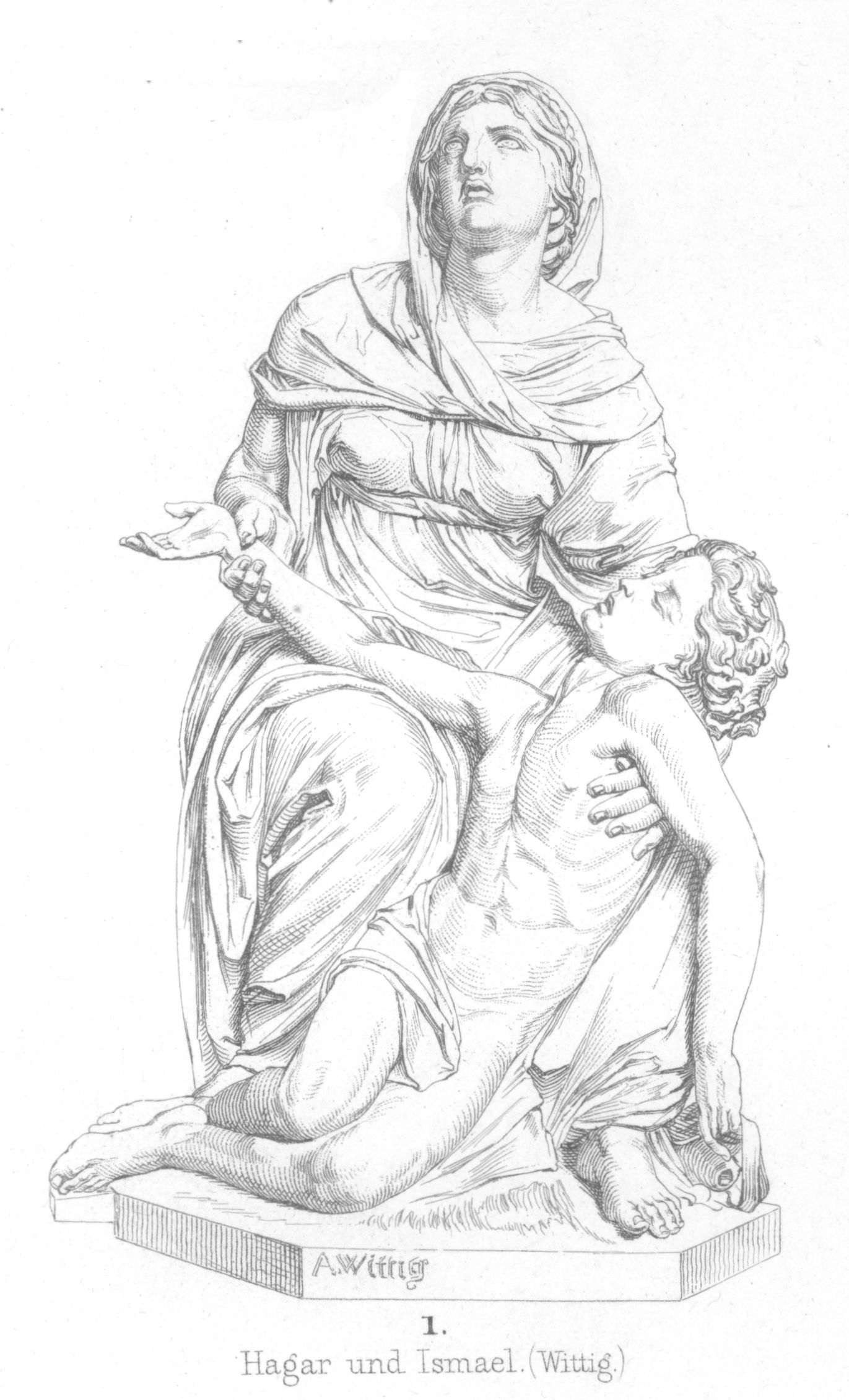 Hagdar und Ismael (1871) von August Wittig (1826-1893)